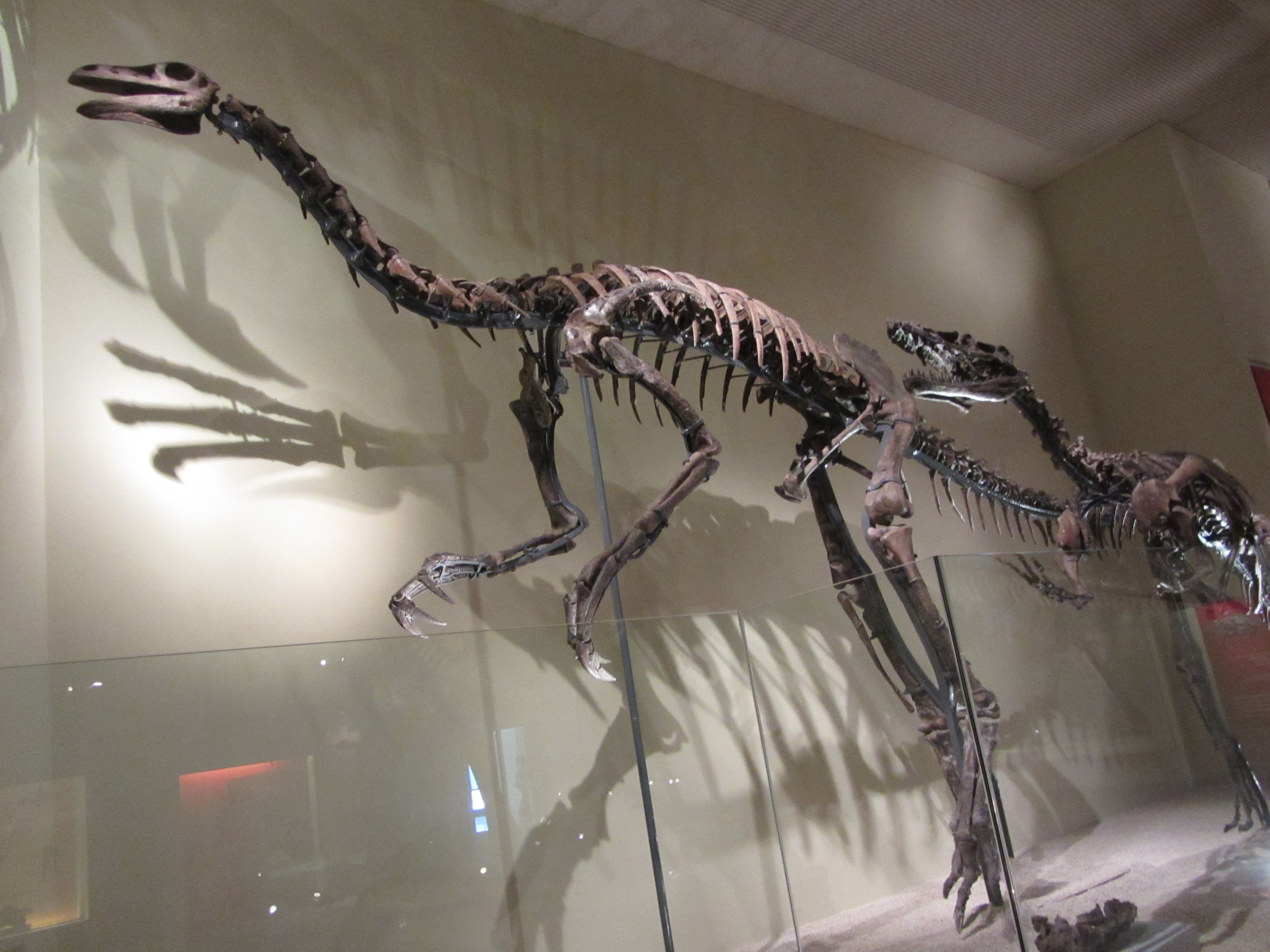 巨大北山龍骨架（較大者）